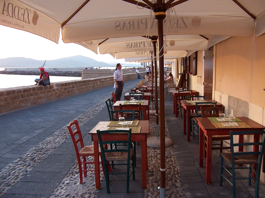 Alghero, Sardegna, Italia